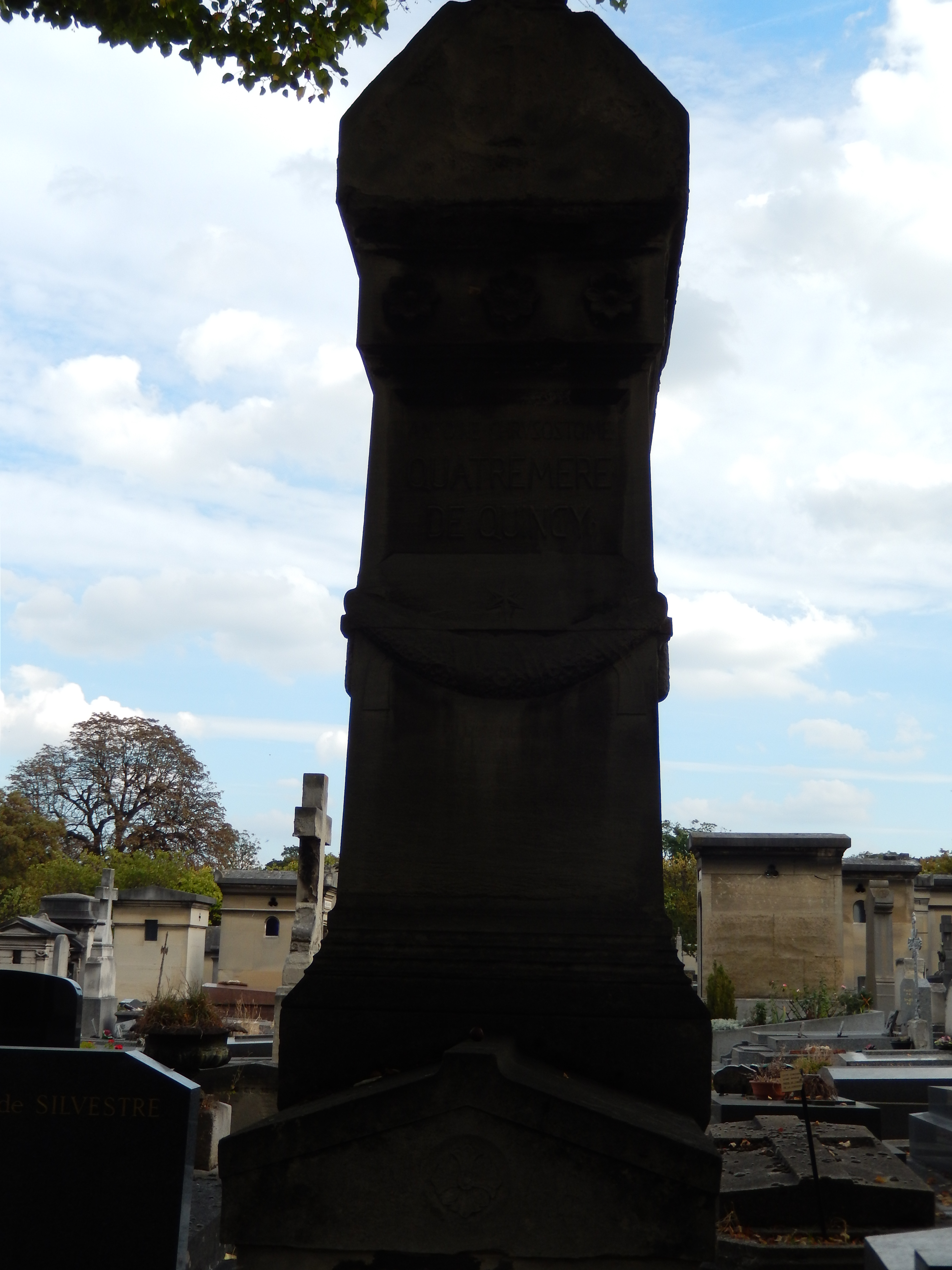 Tombe de Quatremere de Quincy (cimetière du Montparnasse)